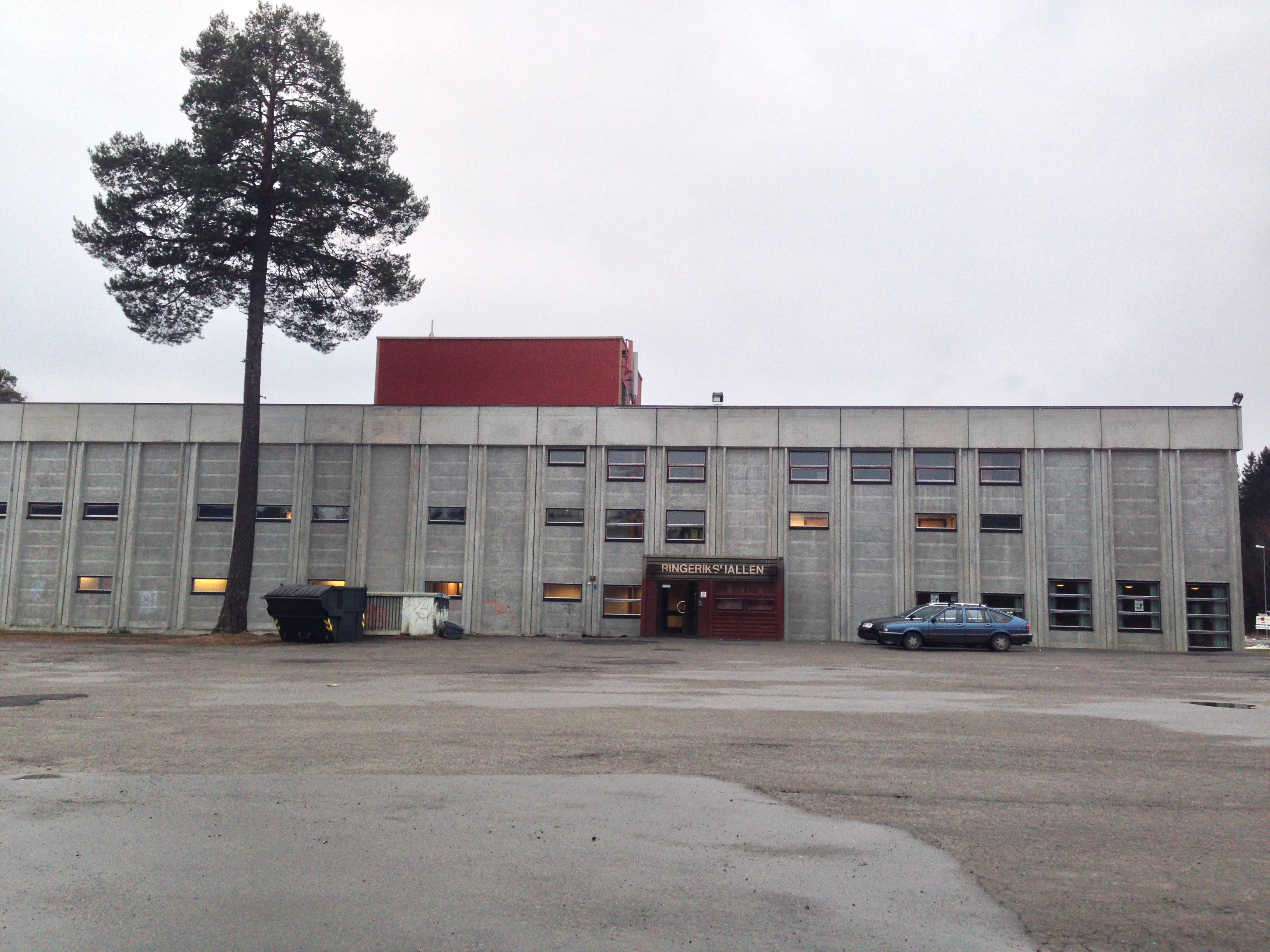 Ringerikshallen, idrettshall i Hønefoss, Buskerud.